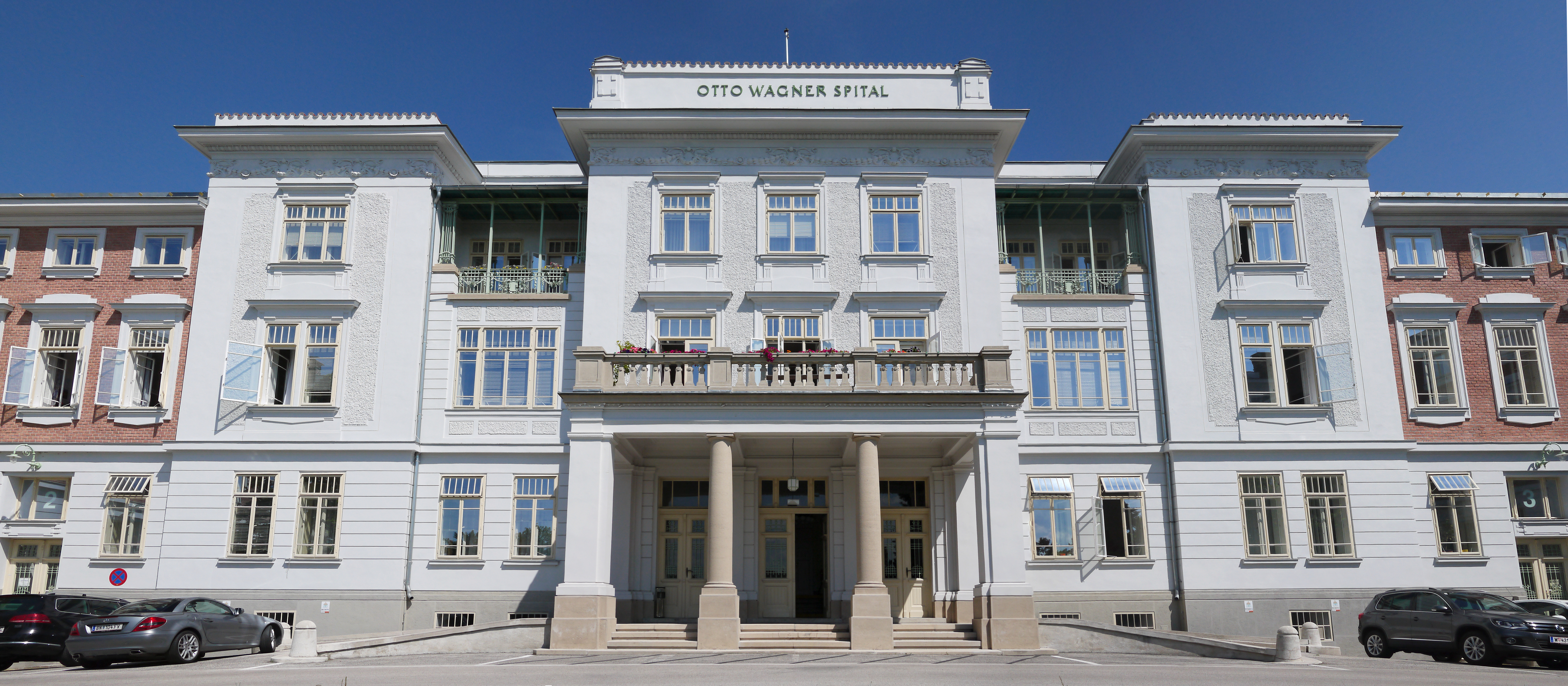 Psychiatrisches Krankenhaus, Heil- und Pflegeanstalt der Stadt Wien